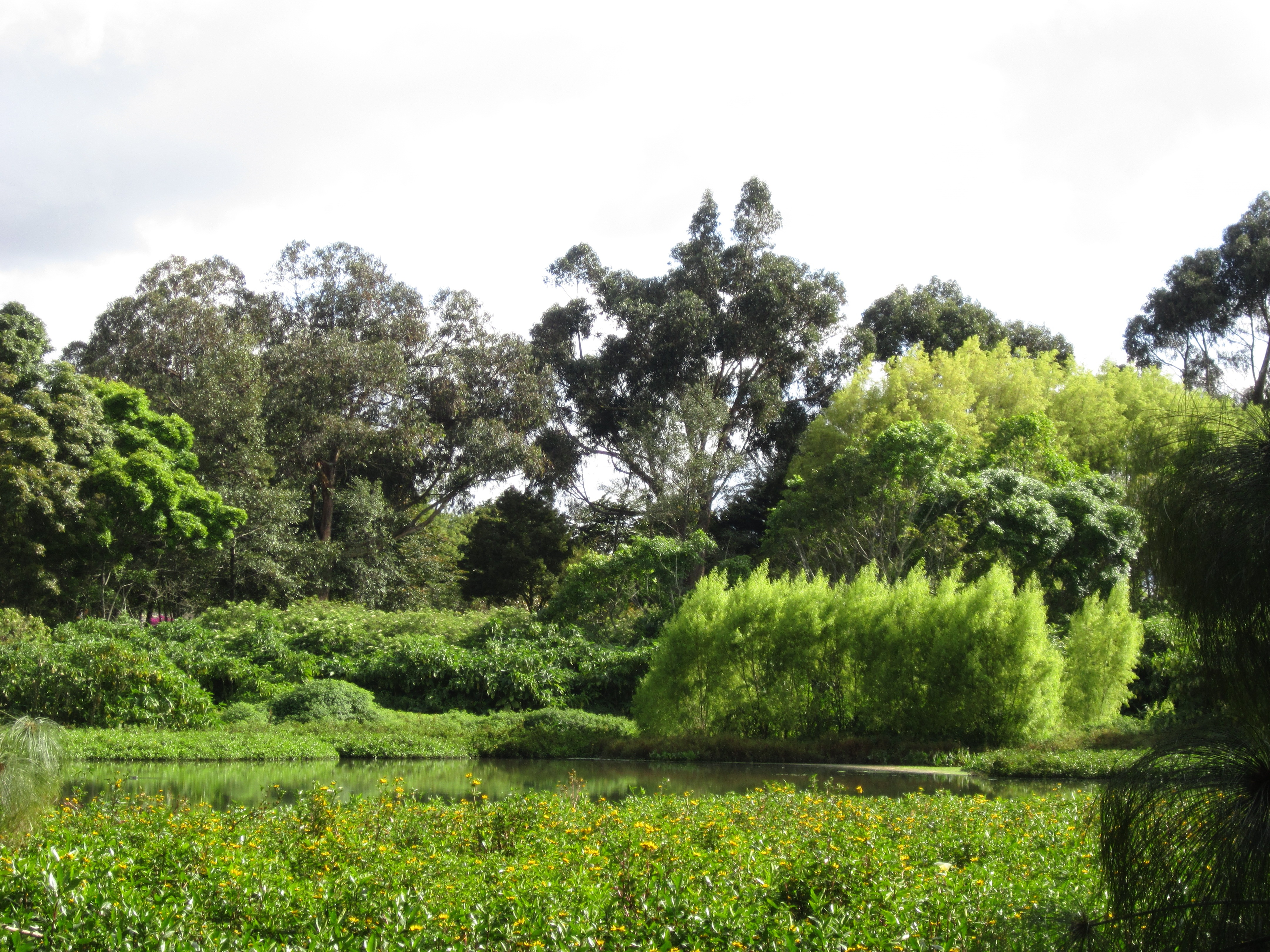 Humedal de Córdoba.